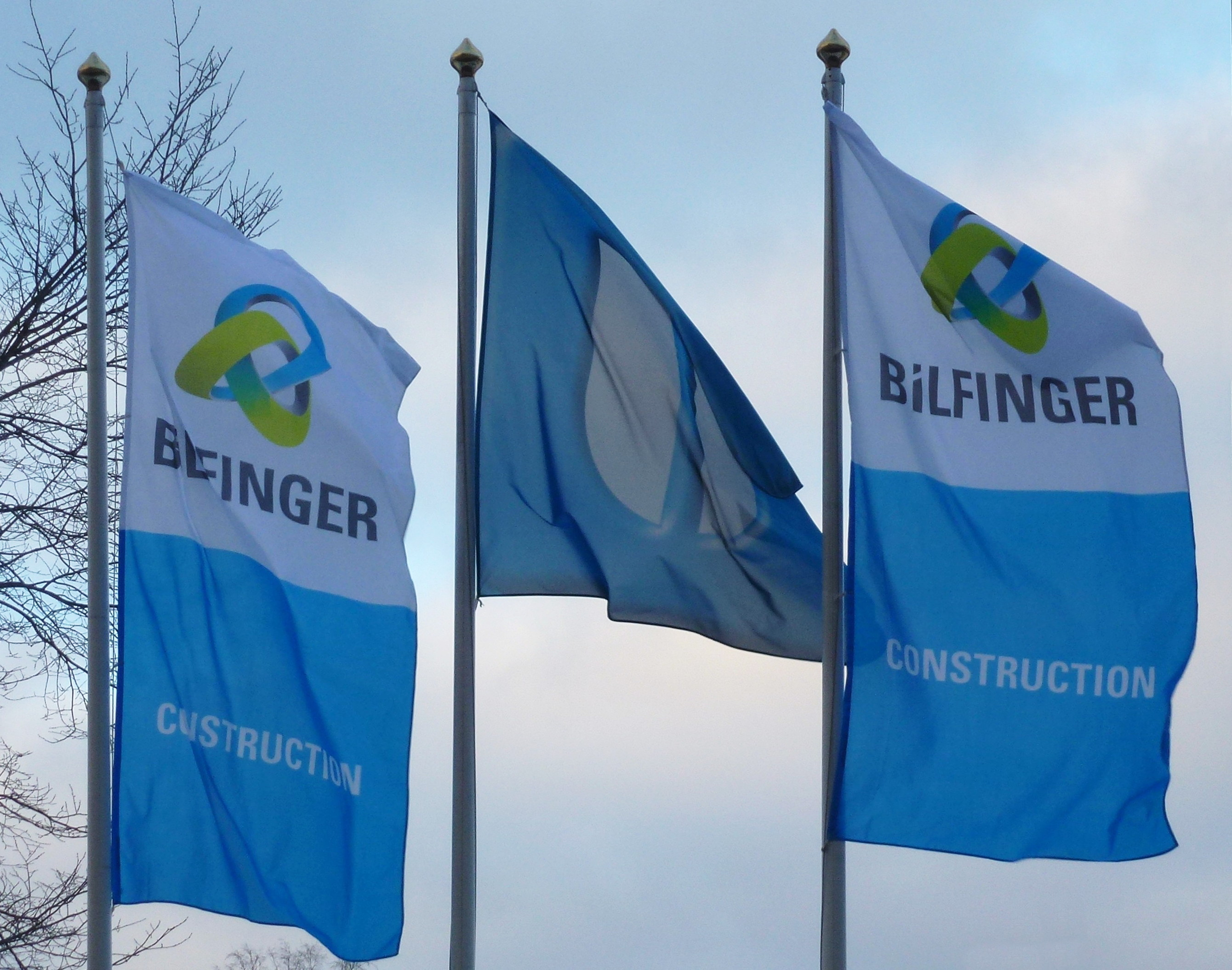 Bilfinger flagga vid Vasatunneln Stockholm